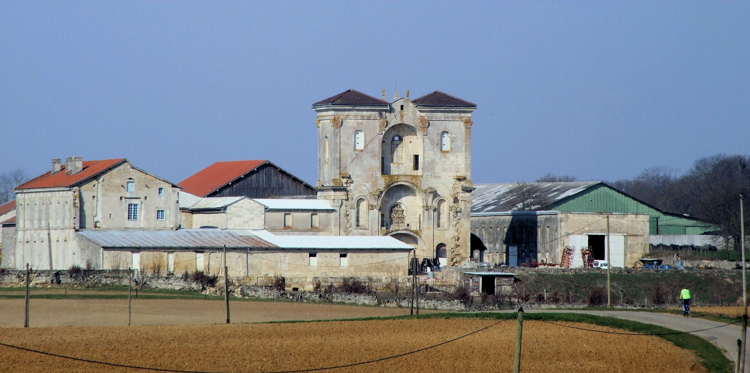 Stainville - Abbaye des Prémntrés de Jovilliers - Une abbaye au milieu des champs